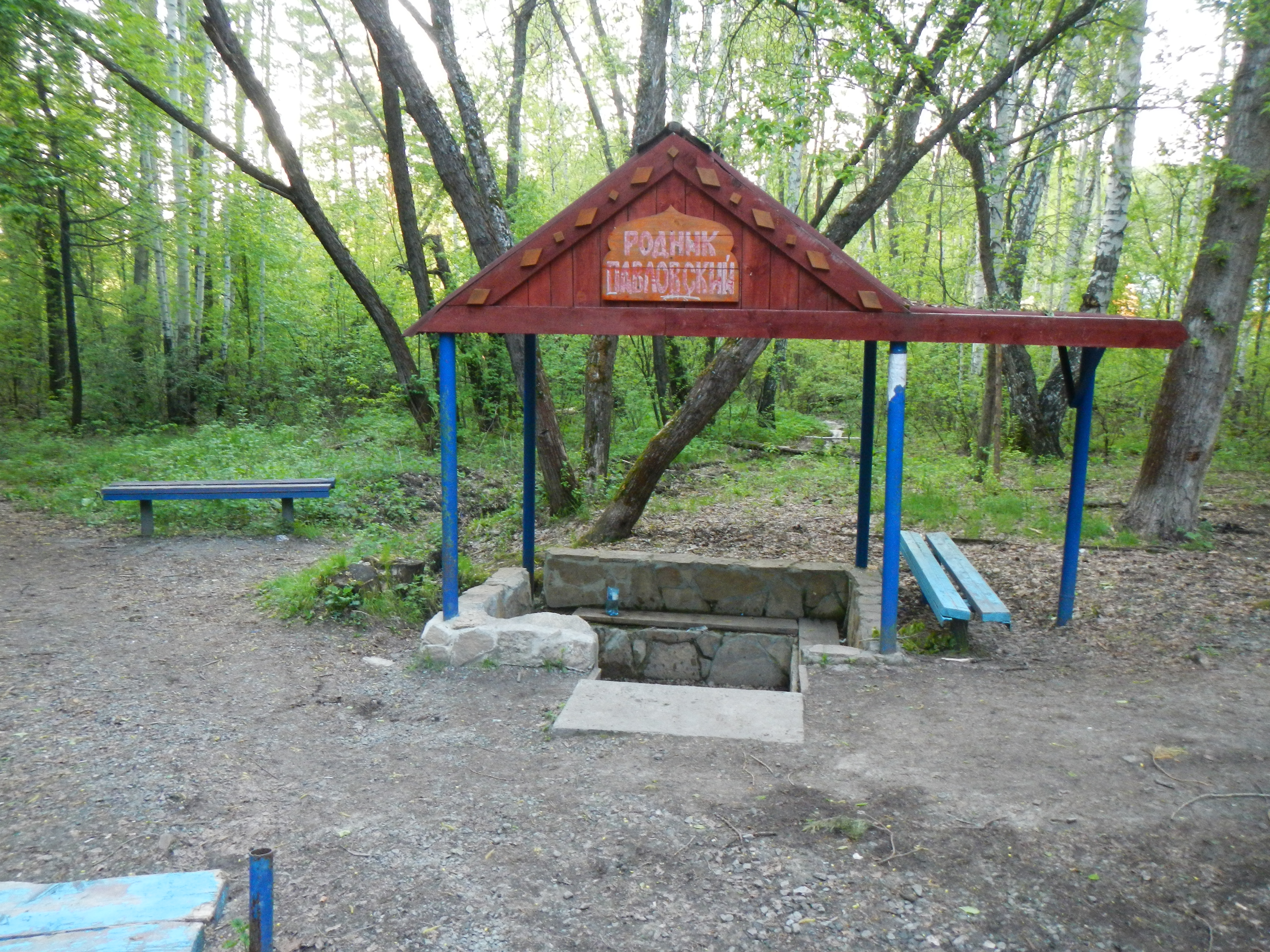 Павловский родник Московского лесопарка г. Екатеринбург.